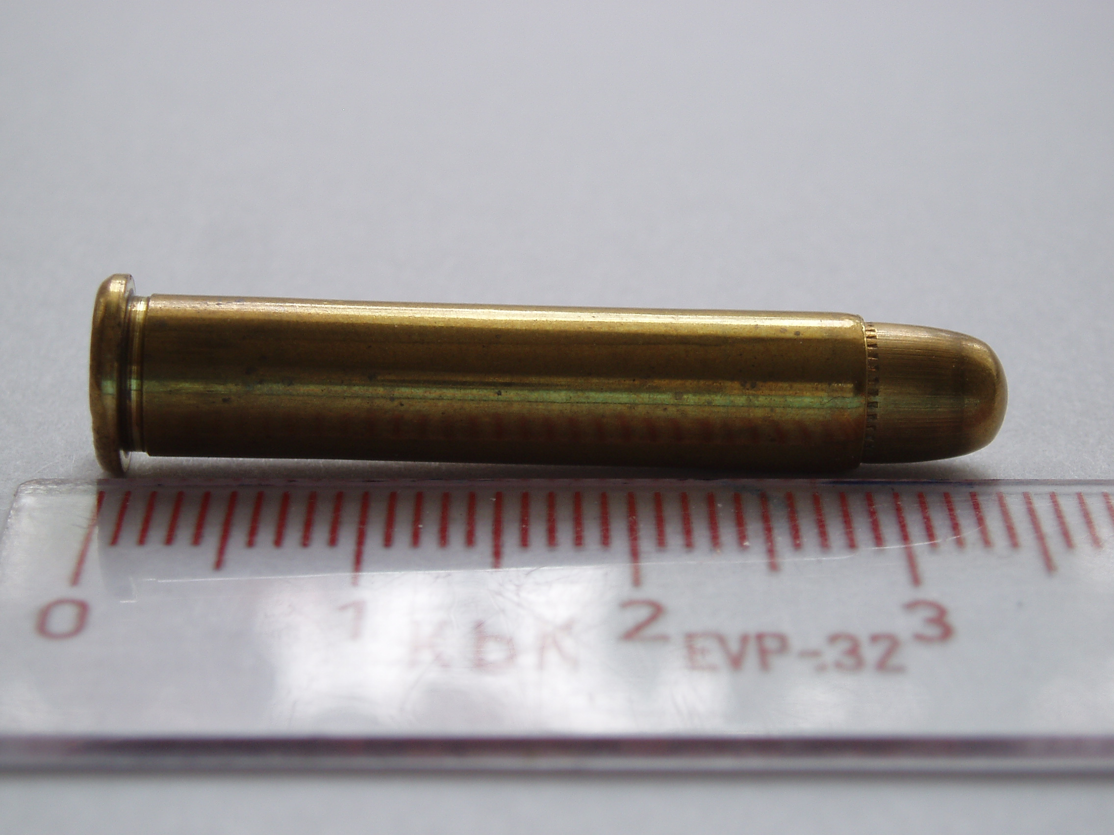 5.75 Velo dog revolver cartrdige.FMJ bullet.